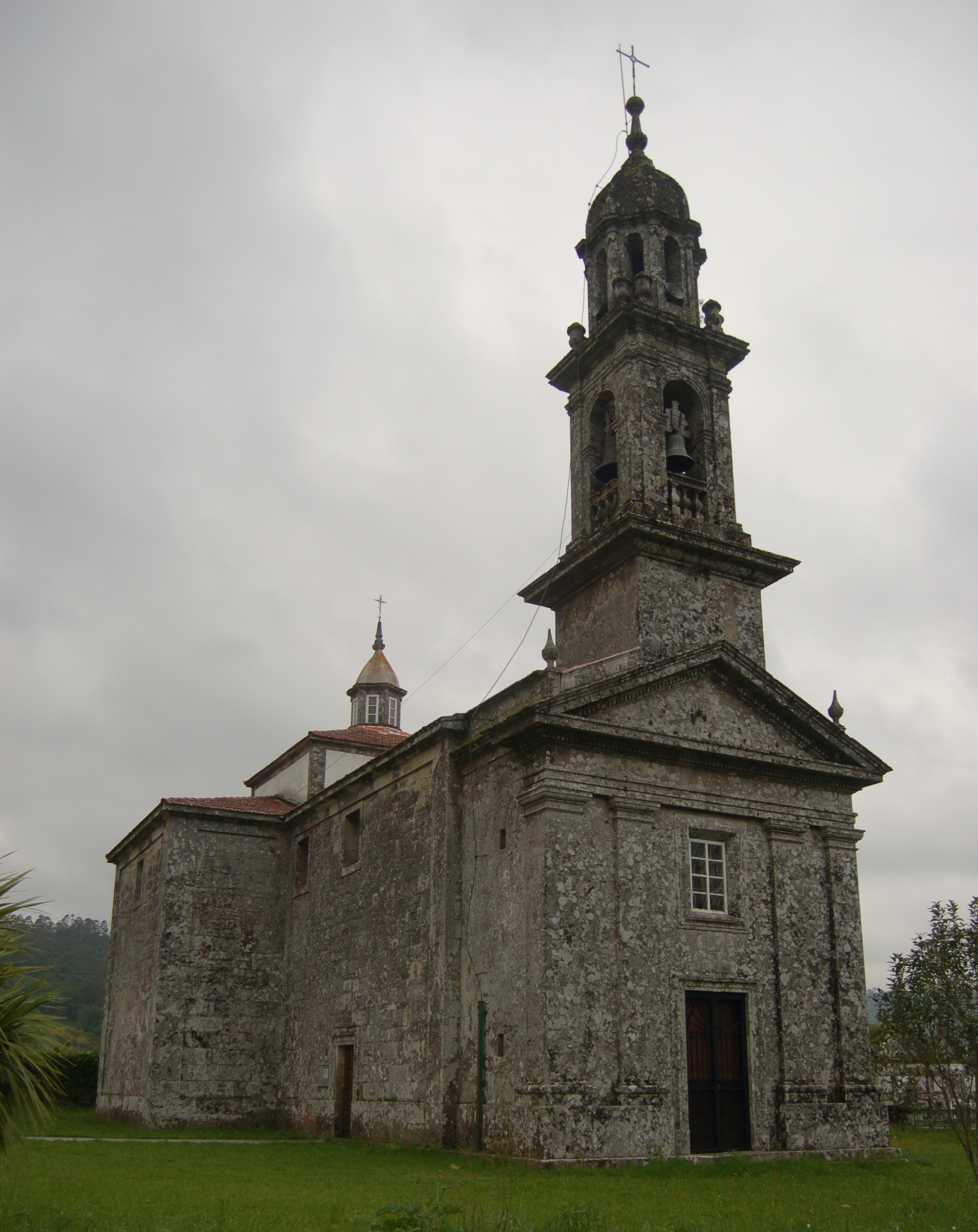 Igrexa parroquial de Santa Mariña de Ribela (A Estrada)